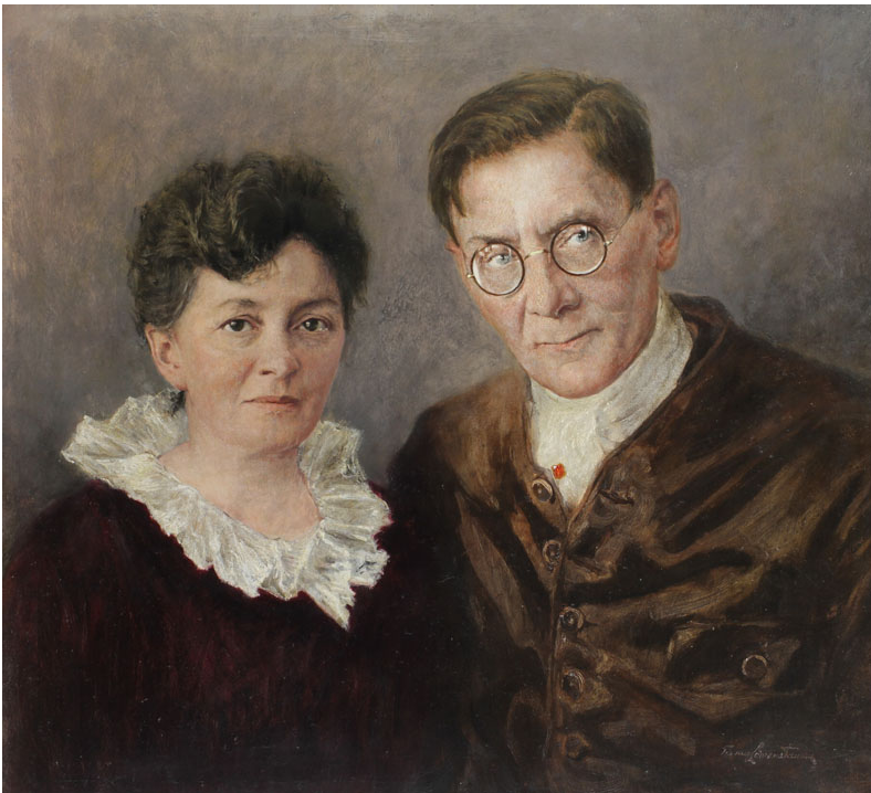 Ölgemälde, 45,5 x 51 cm